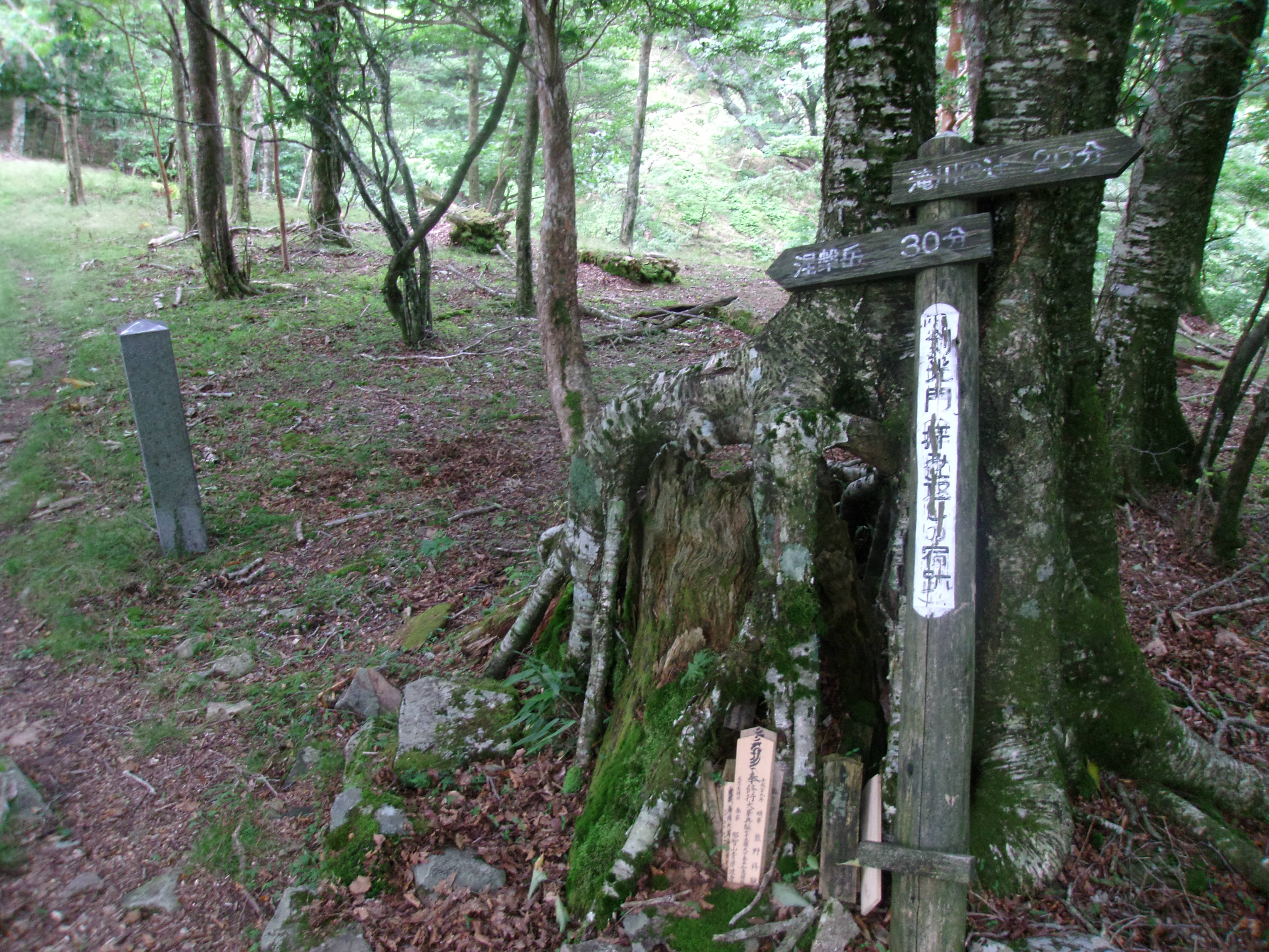 大峯奥駈道第23靡「乾光門」